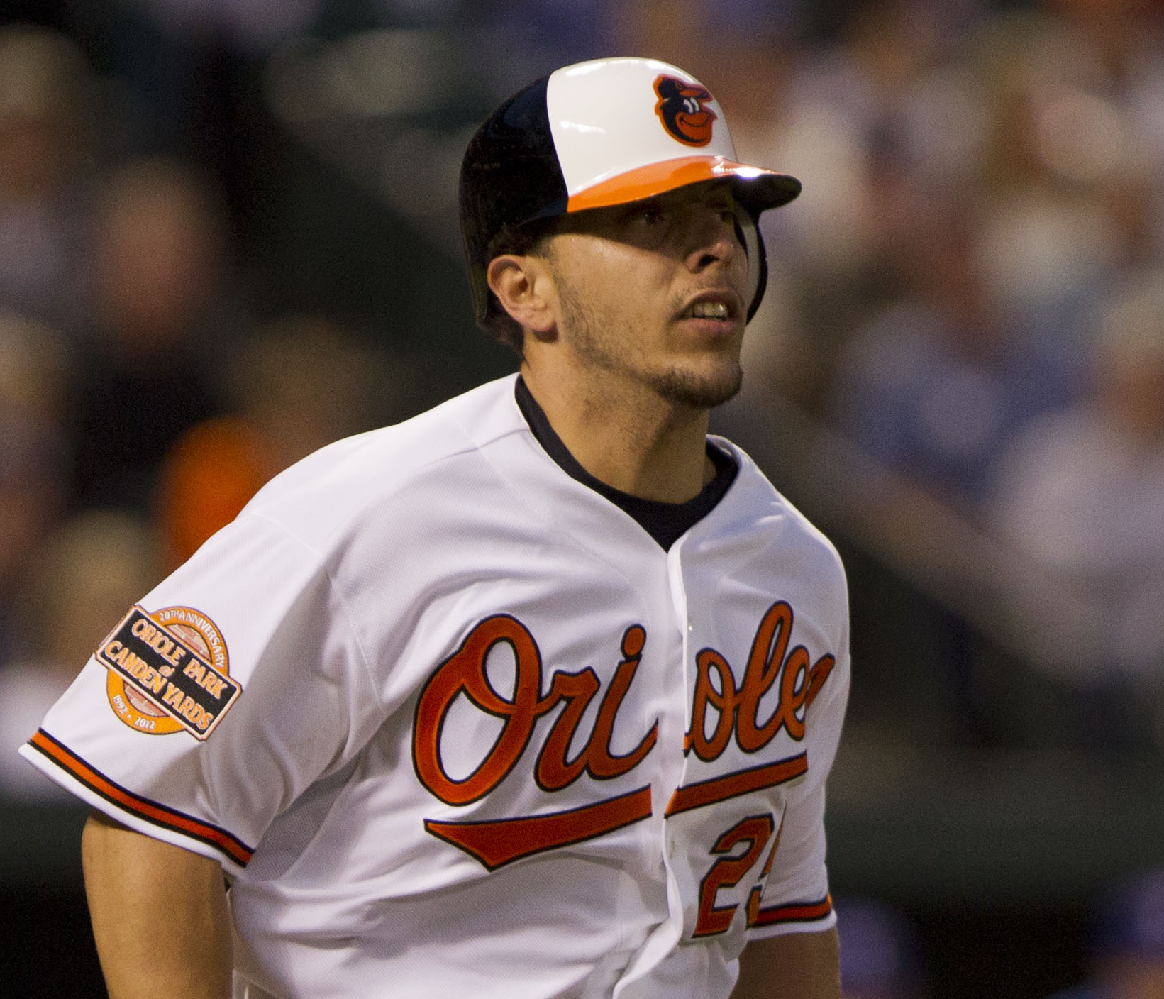 Luis Exposito